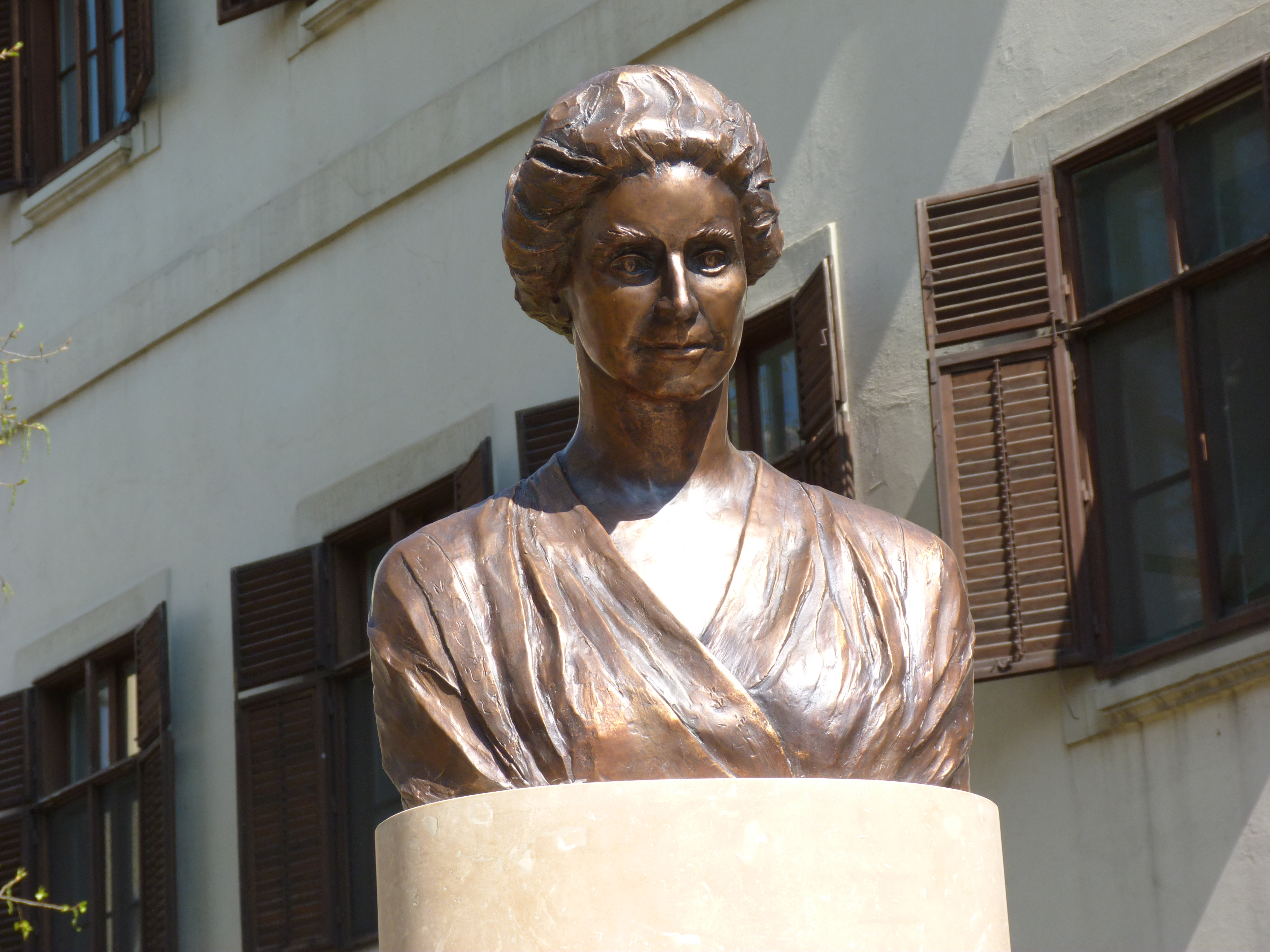 A felvétel 2012. április hó 3 -án, kedden készült Budapesten, a Szent Rókus Kórház előtti parkban. Tormay Cécile írónő (1875 - 1937) szobrát 2012. március hó 31 -én, szombaton avatták fel (1, 2). Tormay Cécil a közeli Kőfaragó utca 3 szám alatti házban lakott (Józsefváros), ahol a közelmúltban helyreállították 1945 -ben elpusztított emléktábláját (3, 4)